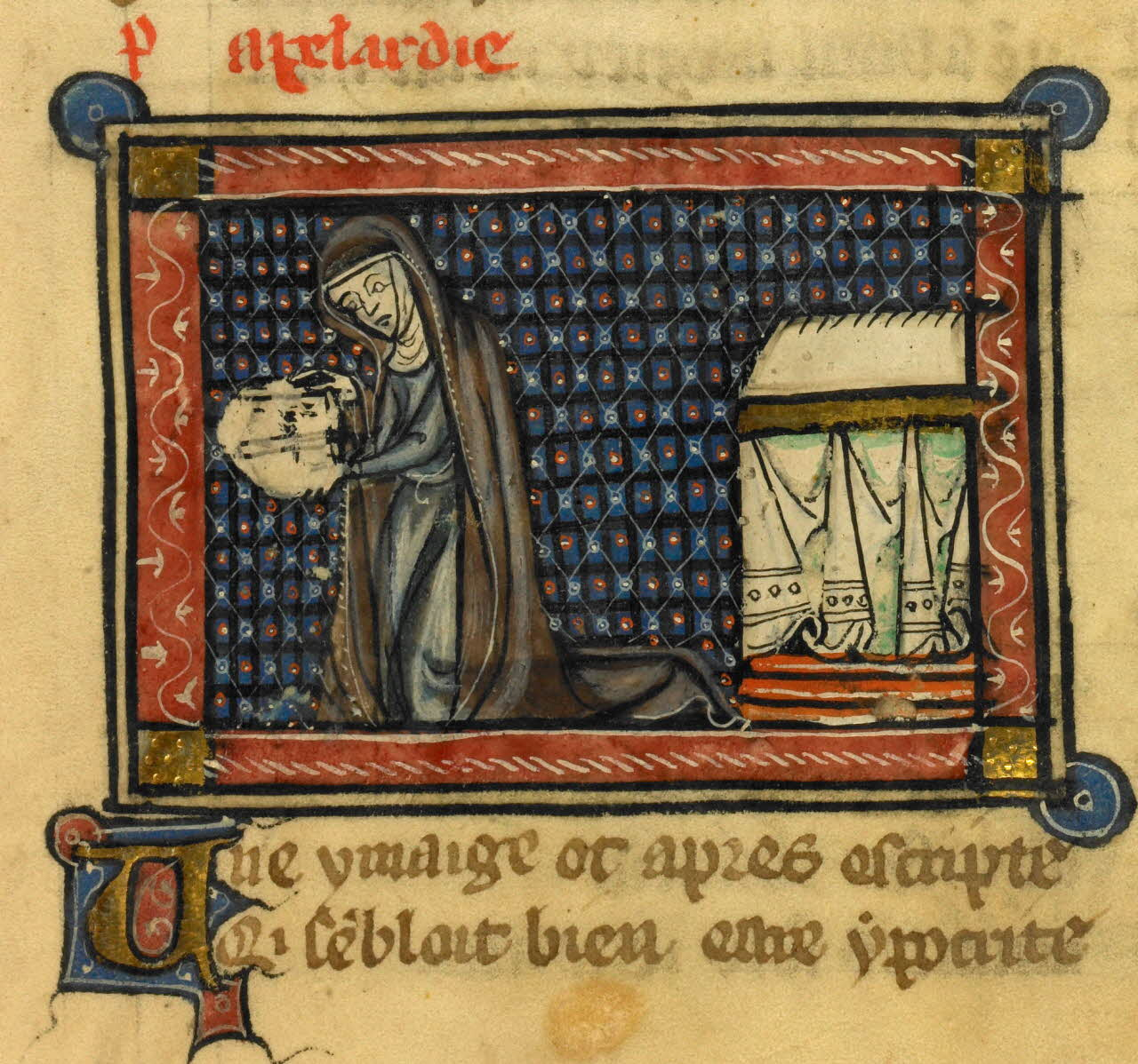 Allégorie de la Papelardie, tirée du Roman de la Rose